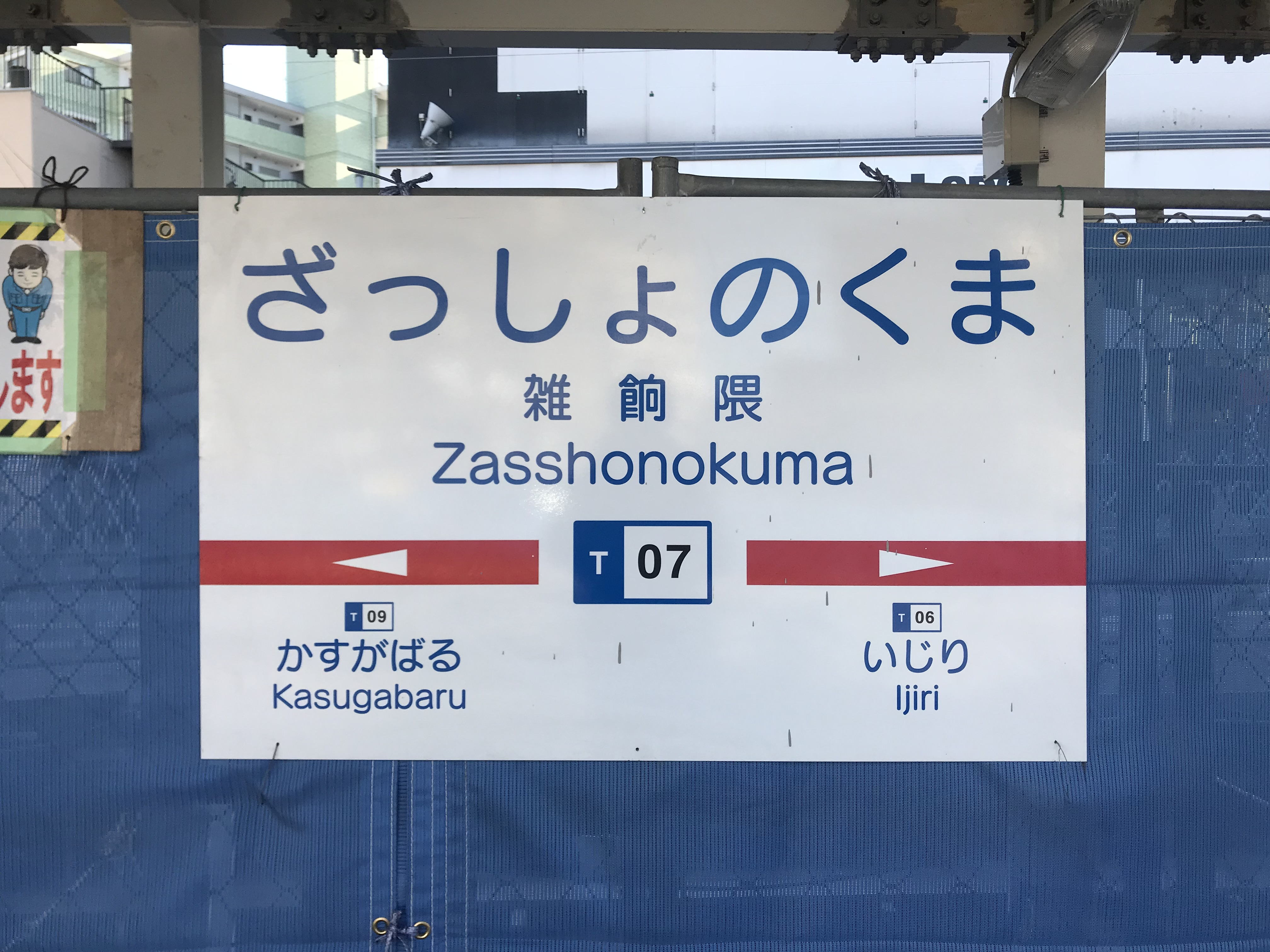 雑餉隈駅の駅名標